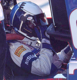 Photographie de Geoff Brabham en 1990.